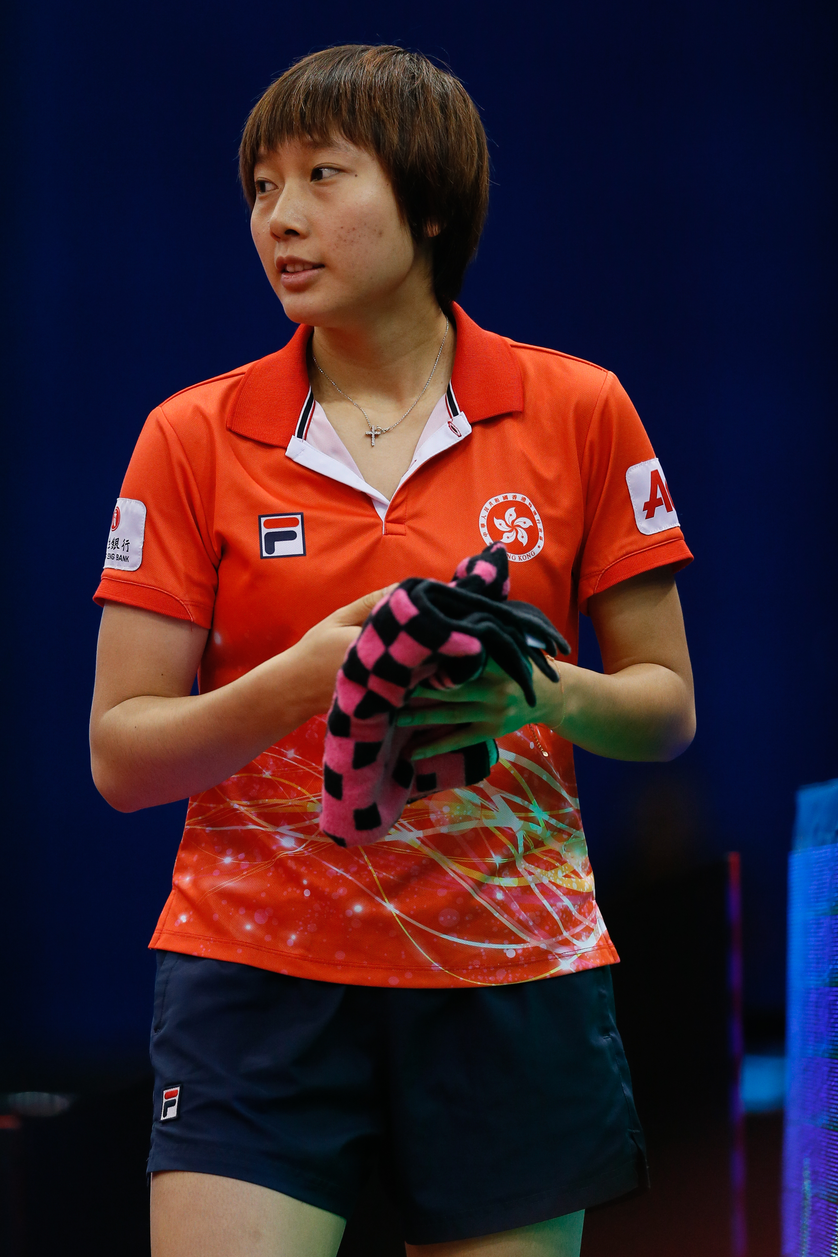 _K0K2938